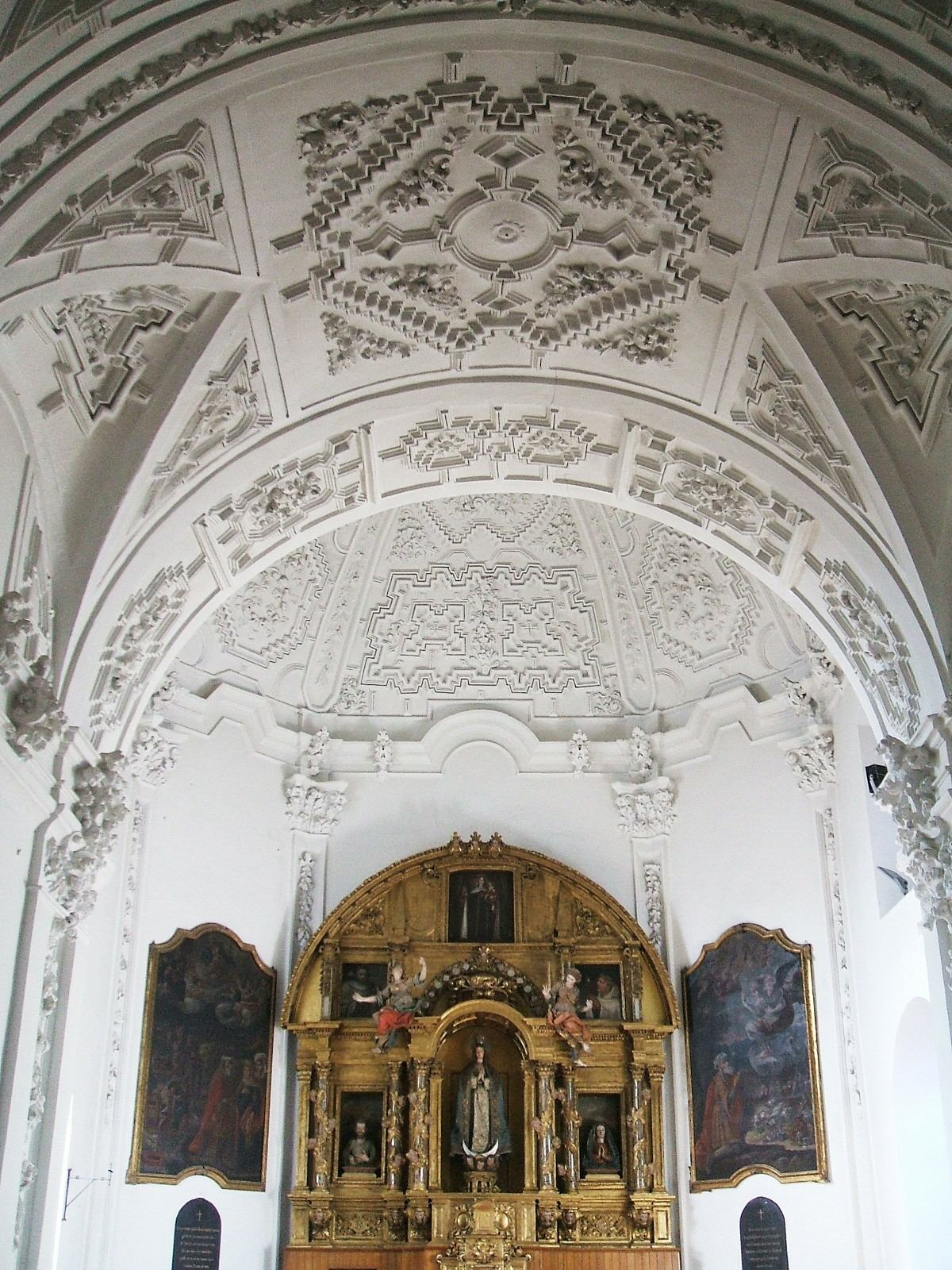 Bóvedas de la Capilla de San Joaquín, Santa Ana y Nuestra Señora de la Mano, en la Iglesia (antiguo convento del Carmen Descalzo) de Nuestra Señora del Carmen Extramuros, Valladolid, España/Spain